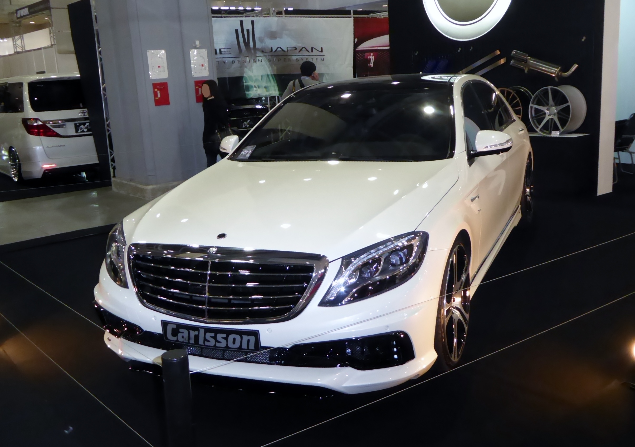 大阪オートメッセ2015においてカールソン・CS50を撮影。